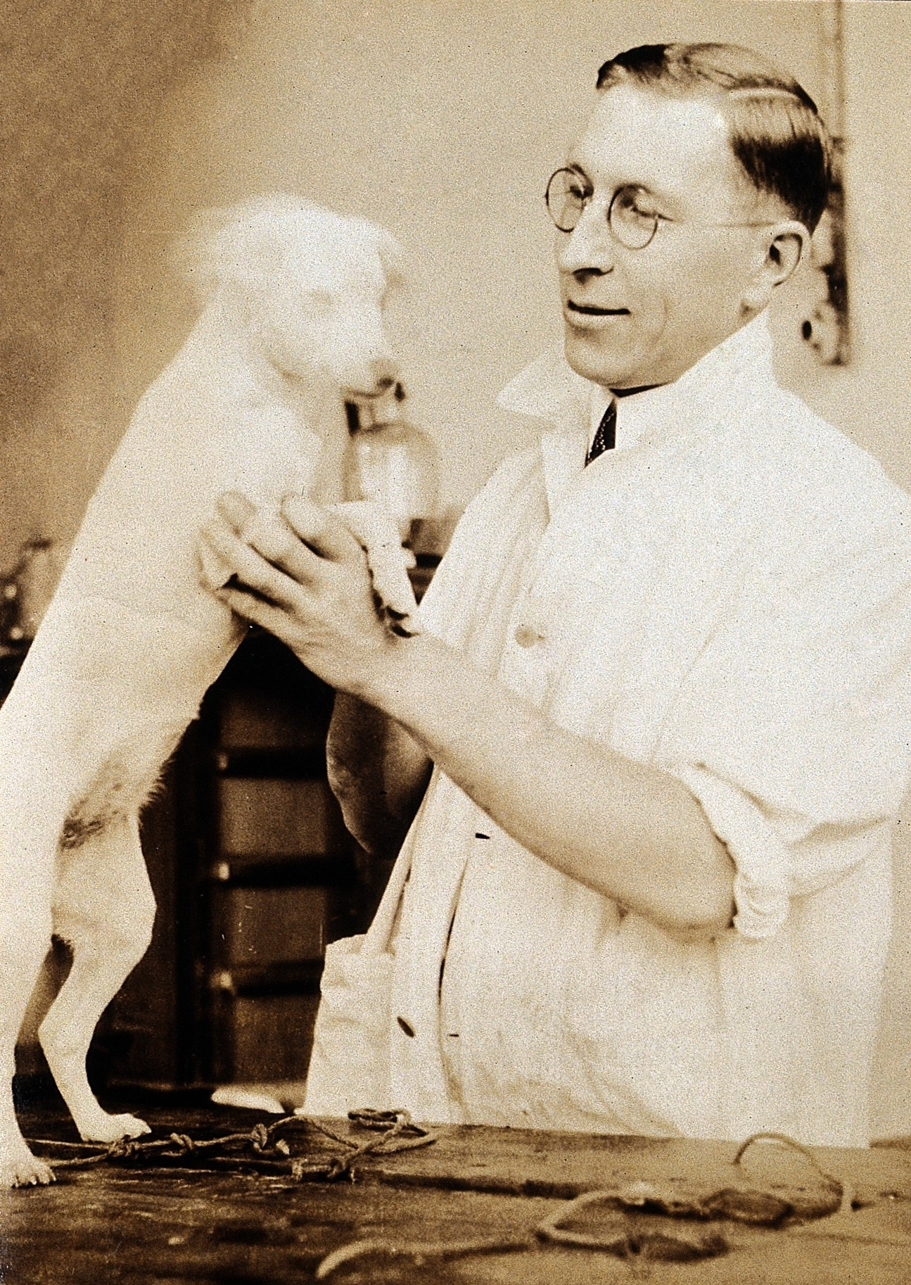 Frederick Banting